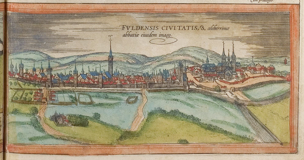 Fulda